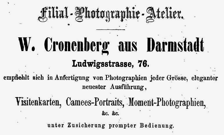 Anzeige des Hoffotografen Wilhelm Cronenberg (1836-1915) in Bad Kissingen